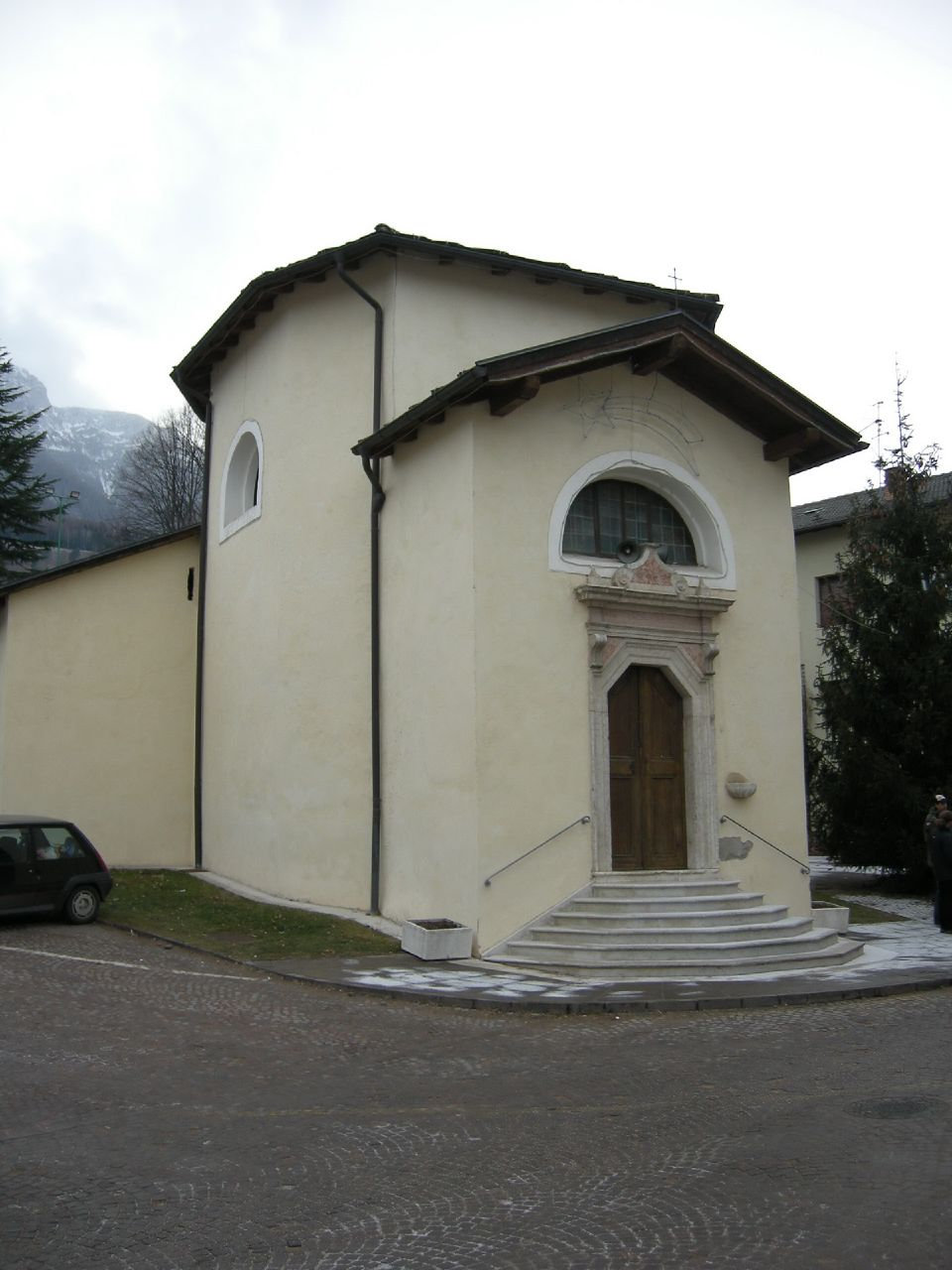 Chiesetta di San Rocco all'incrocio fra via Dante Alighieri e via Dosso a Vattaro.